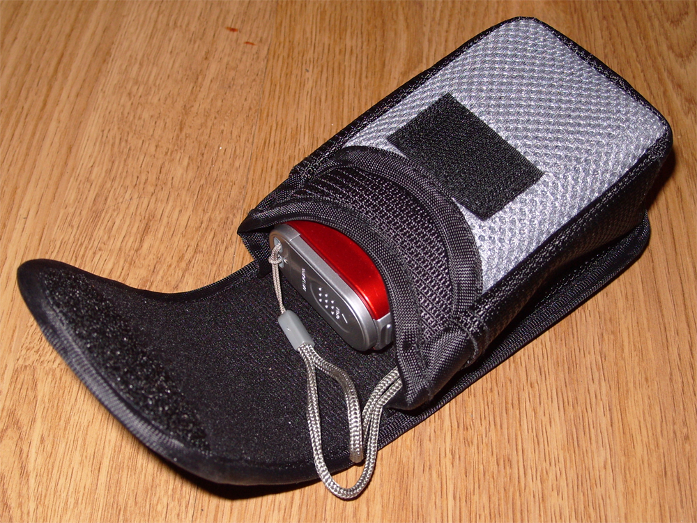 Kameraväska